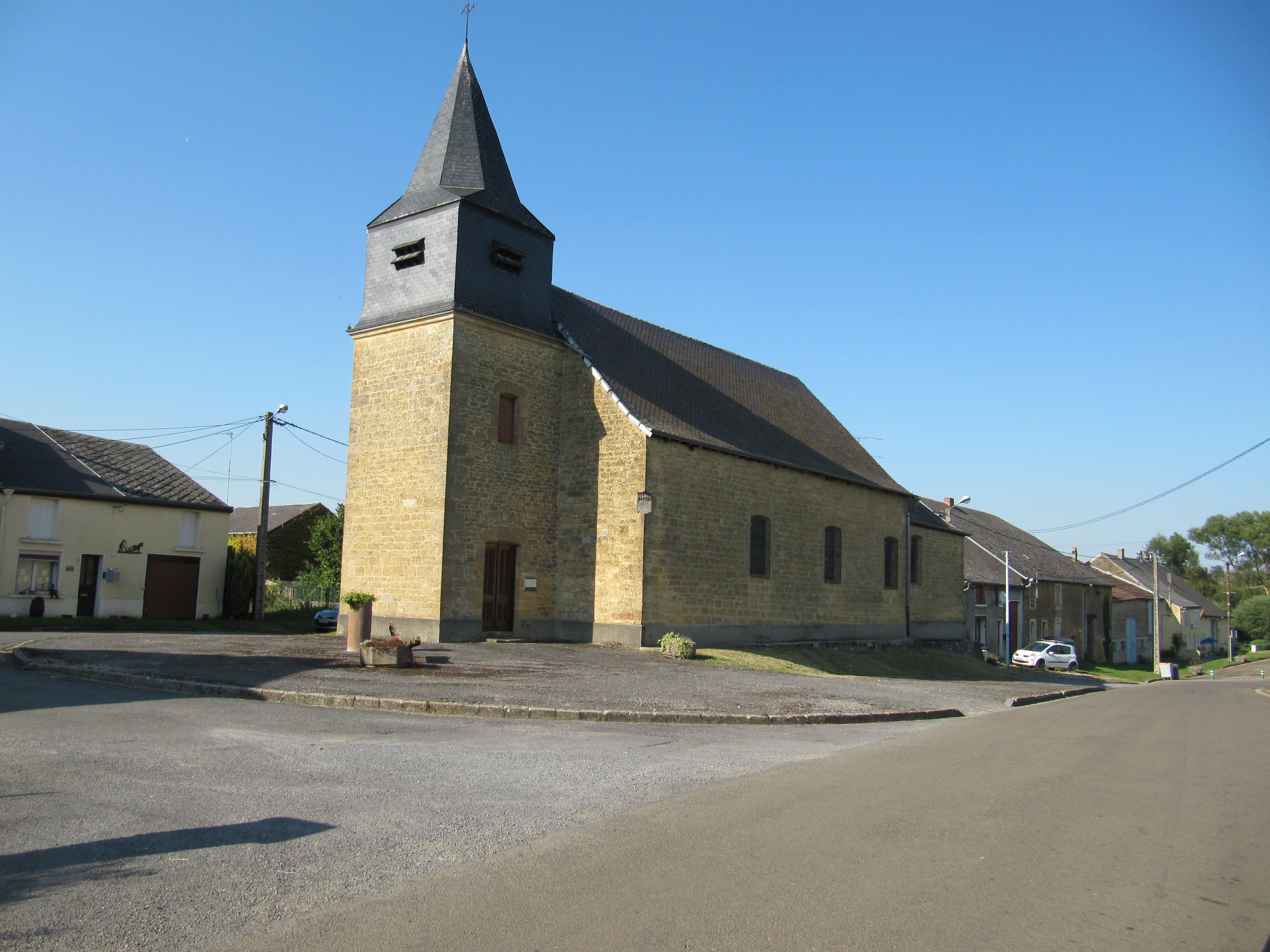 Église de Tétaigne - Ardennes - France